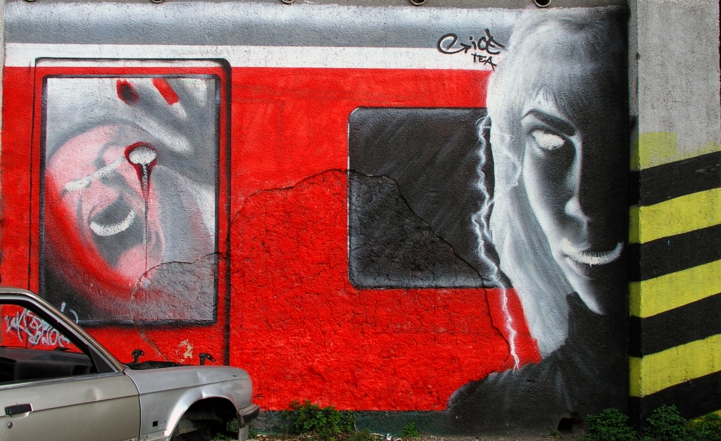 grafiti u Rijeci (Mrtvi kanal)